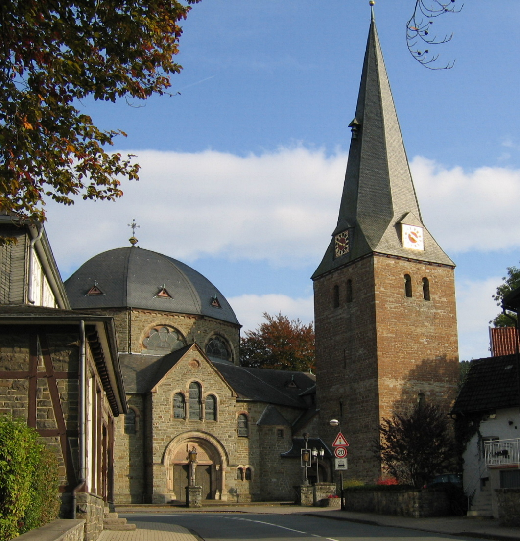 Description: Pfarrkirche St. Blasius (romanische Hallenkirche, 12./13. Jahrhundert) in Balve Source: selbst fotografiert Date: 9. Okt. 2005 Author: Bubo